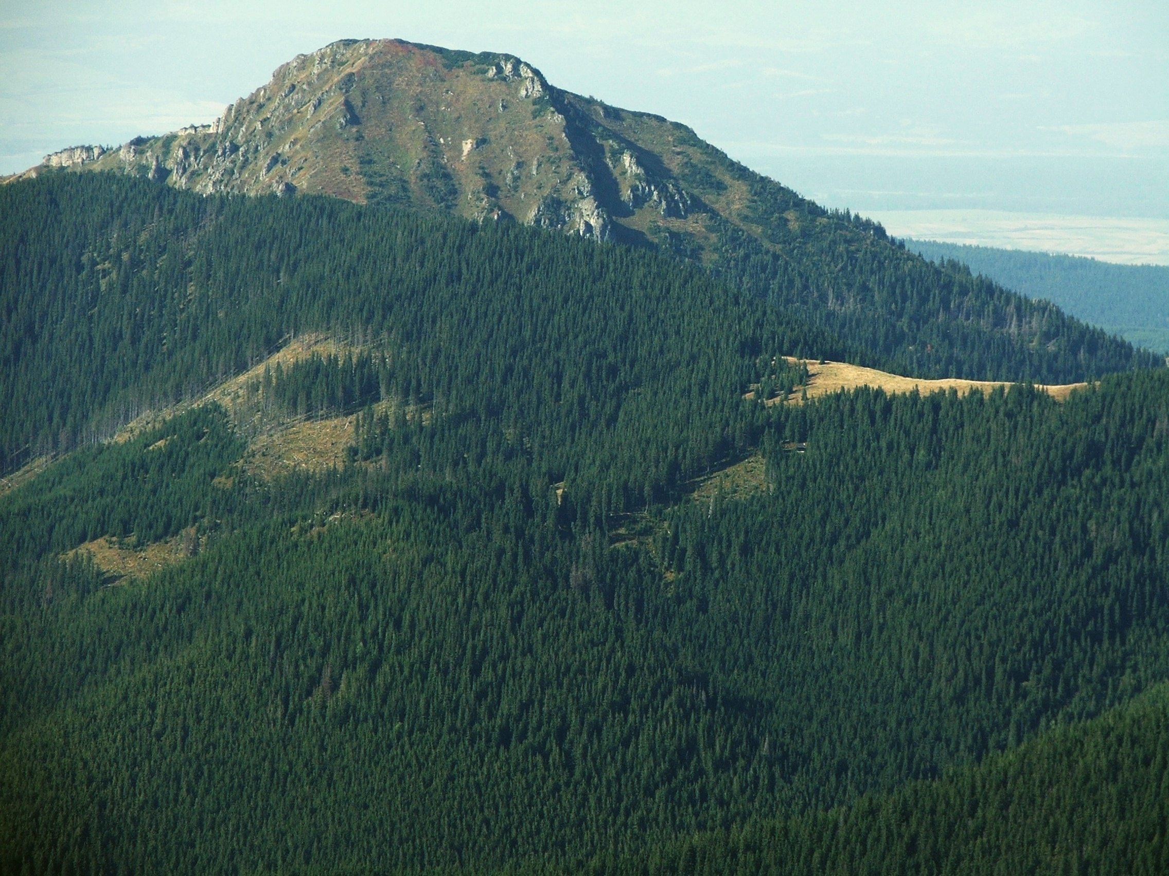 Osobita (slov. Osobitá), West Tatra Mountains